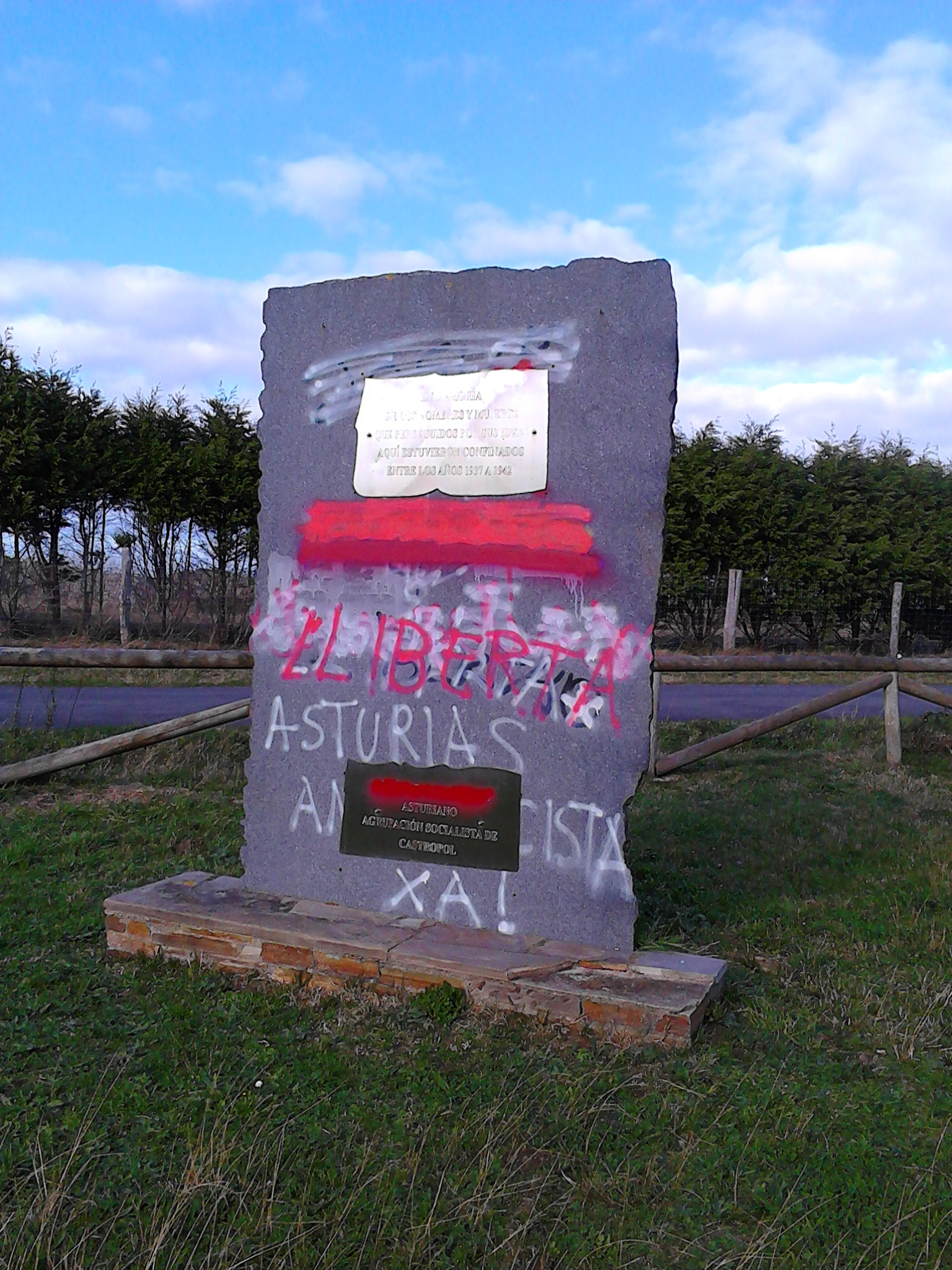 Monolito commemoración do campo concentración Arnao, erixido polos socialistas de Castropol. As placas din: 'En memoria de los hombres y mujeres que perseguidos por sus ideas aquí estuvieron confinados entre los años 1937 - 1942' (a superior) e '100 años de socialismo asturiano. Agrupación socialista de Castropol'. Pode observarse que os ataques son sucesivos.